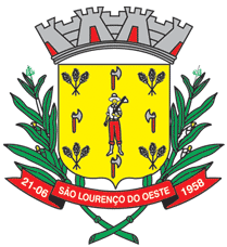 Blason de la municipalité de São Lourenço do Oeste -SC - Brésil